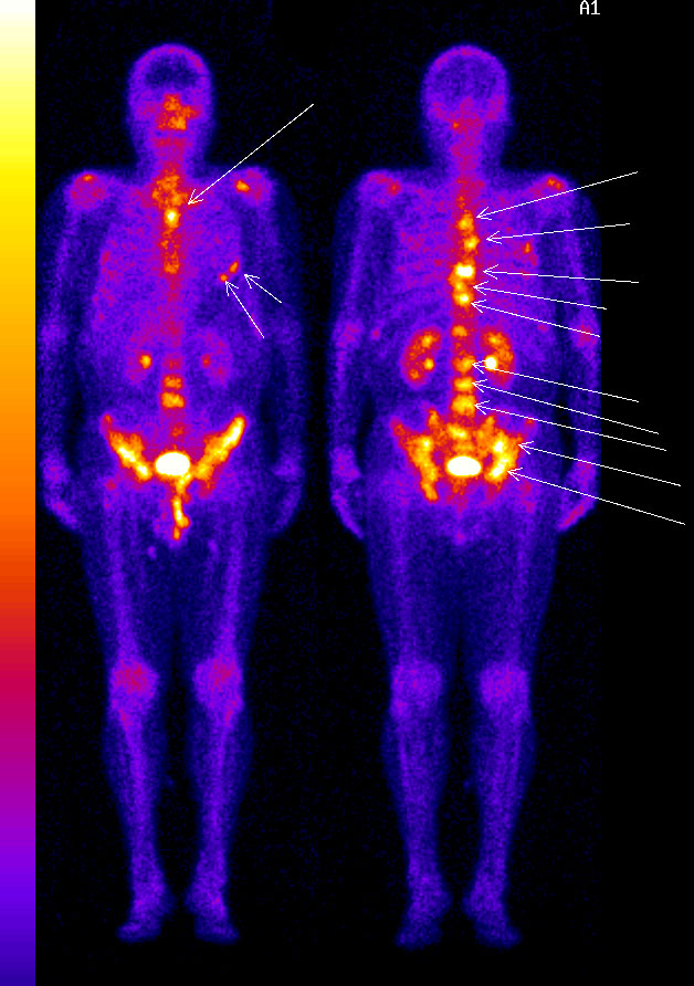 Сцинтиграфия метастатического поражения скелета с помощью РФП "Резоскан" (99mTс-золедроновая кислота)